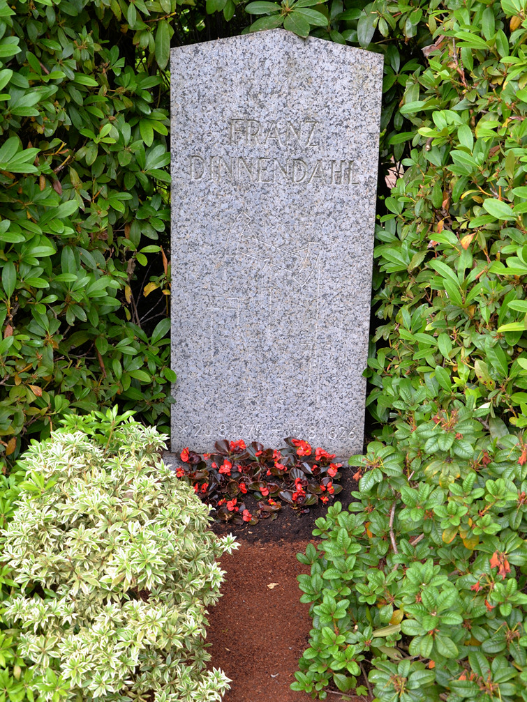 Franz Dinnendahls "Ehrengrab der Stadt Essen" auf dem Essener Südwestfriedhof